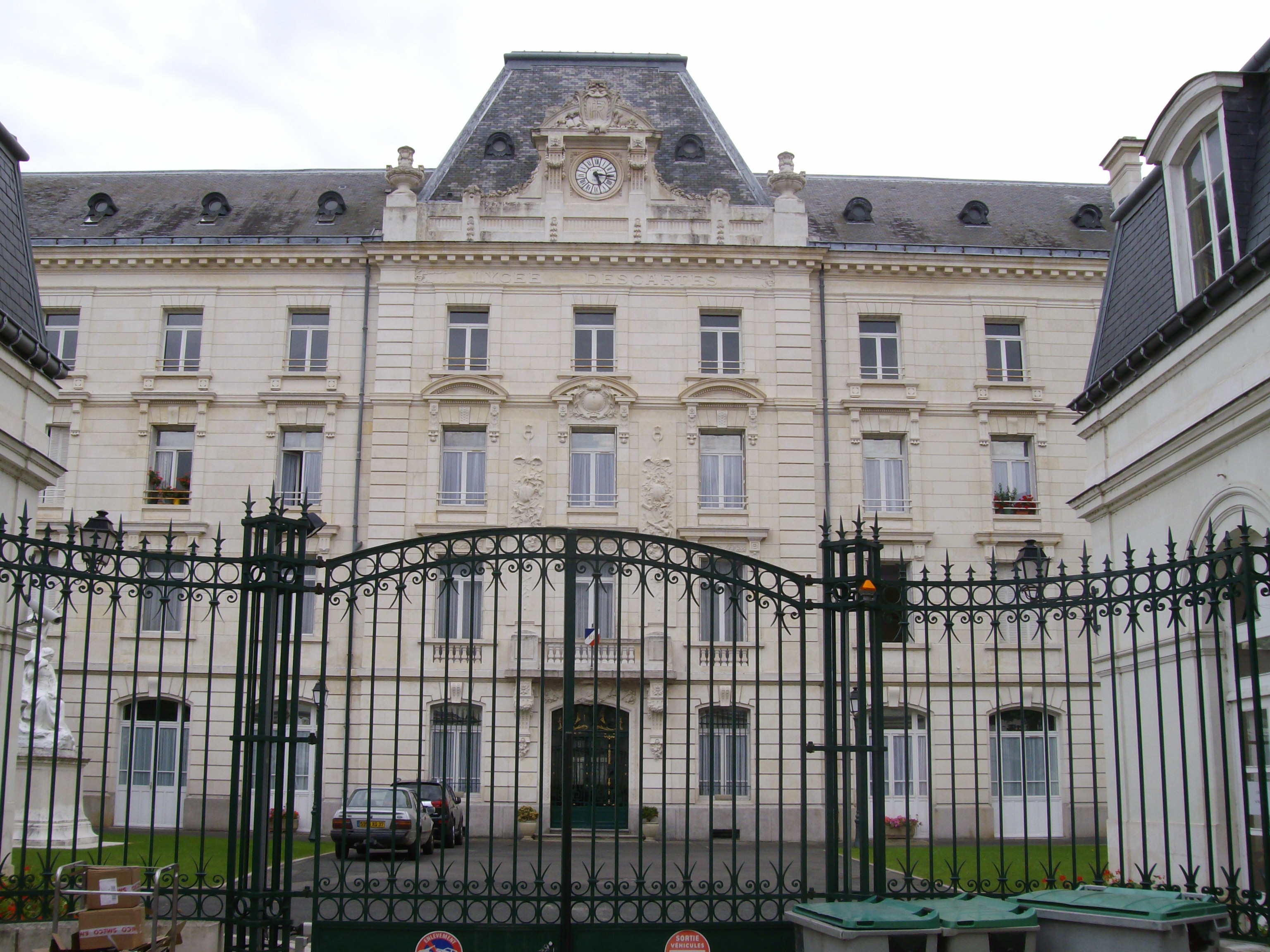 Lycée Descartes à Tours, France. Côté cour d'honneur.